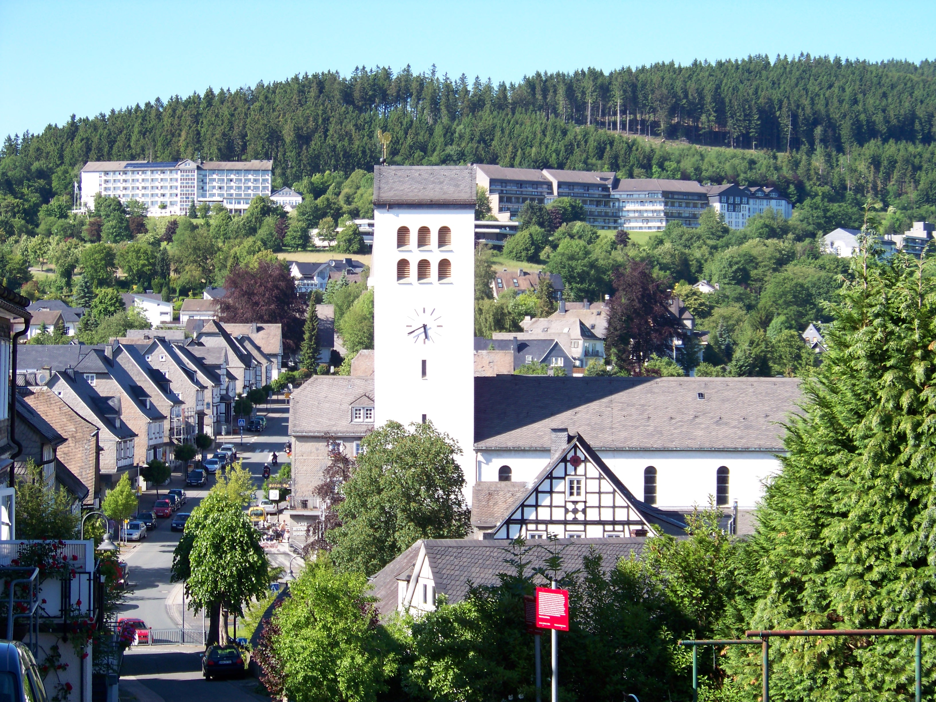 Bad Fredeburg (Schmallenberg), Germany.